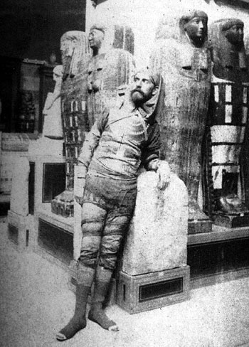 Eduard Toda i Güell disfrazado como una momia en el Museo de Bulaq (El Cairo).